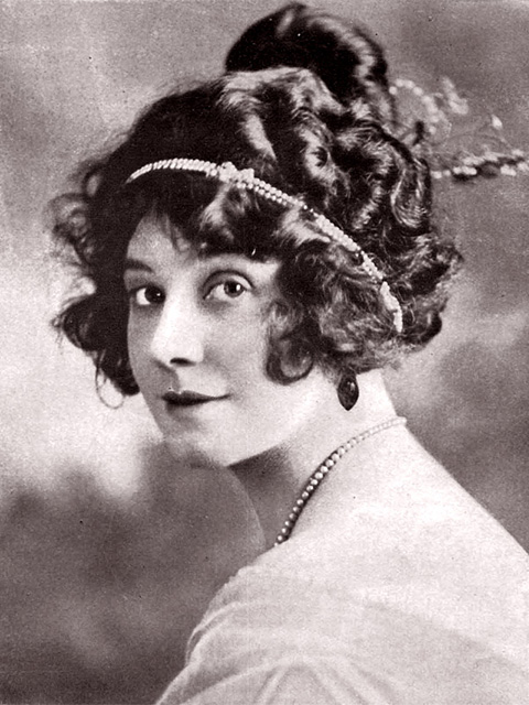 Minta Durfee, actrice du cinéma muet américain.